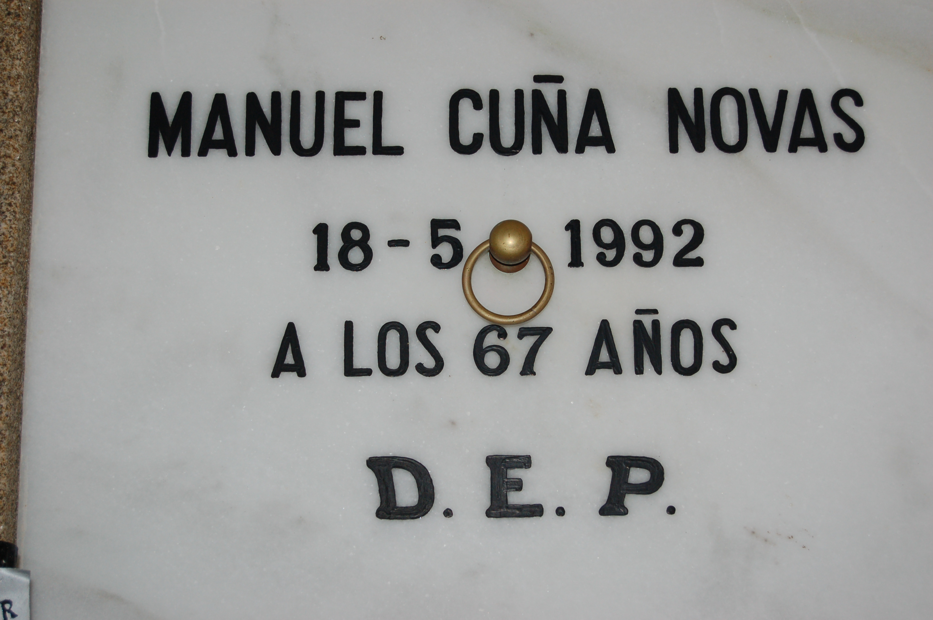 Nicho de Manuel Cuña Novás no Cemiterio de San Amaro de Pontevedra